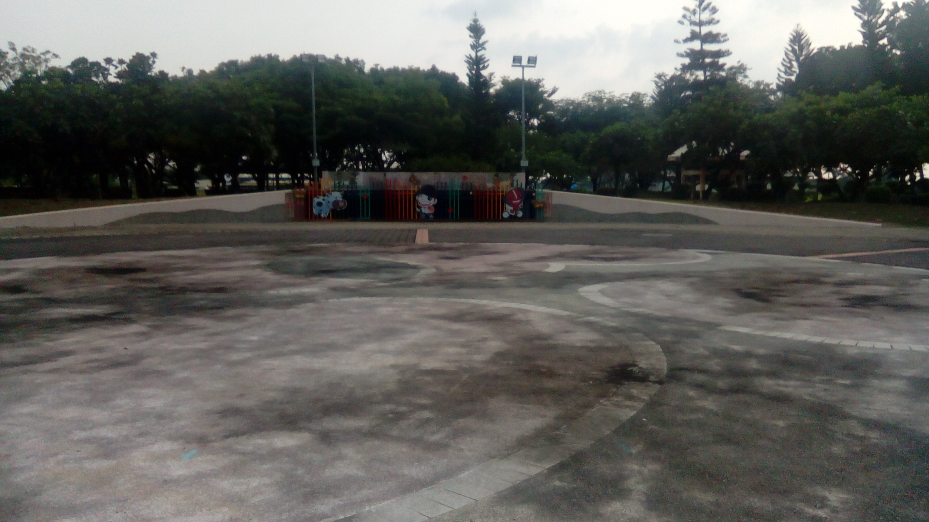 同上